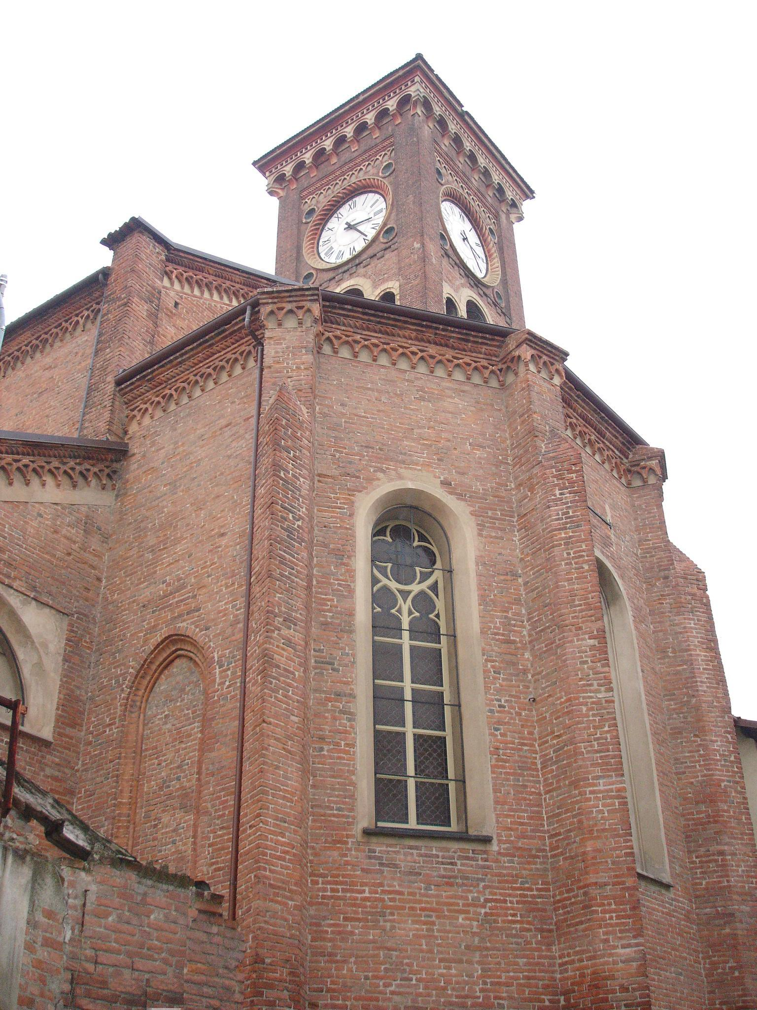 Abside Santa Maria di Castello